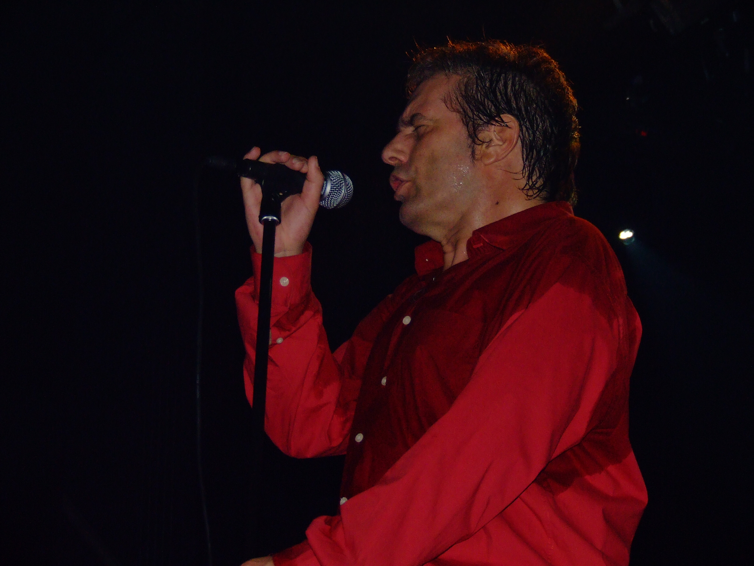 Adolfo Luxuria canibal, vocalista dos Mão Morta no SÃO MAMEDE Centro de Artes e Espectáculos de Guimarães.